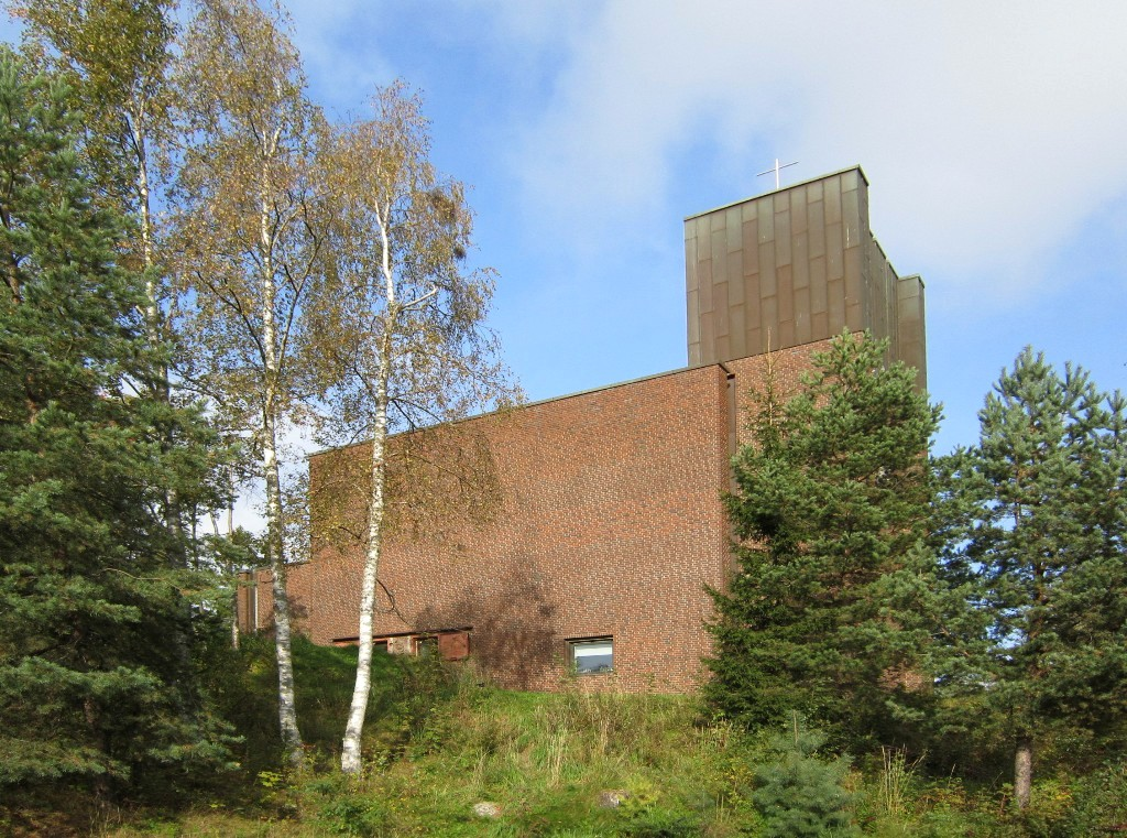 Greverud kirke (Oppegård kommune, Akershus)